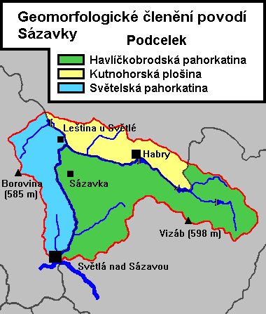 Geomorfologické členění povodí Sázavky